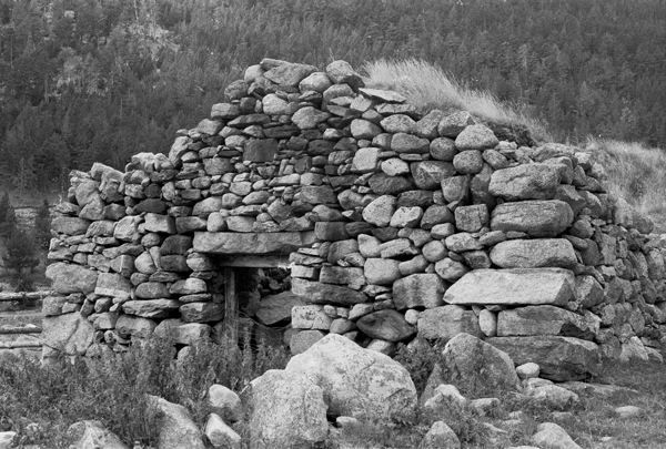 Cortal du Pla de l'Orri à Sansa (Pyrénées-Orientales) : le pignon-façade avec son entrée axiale et son fronton.